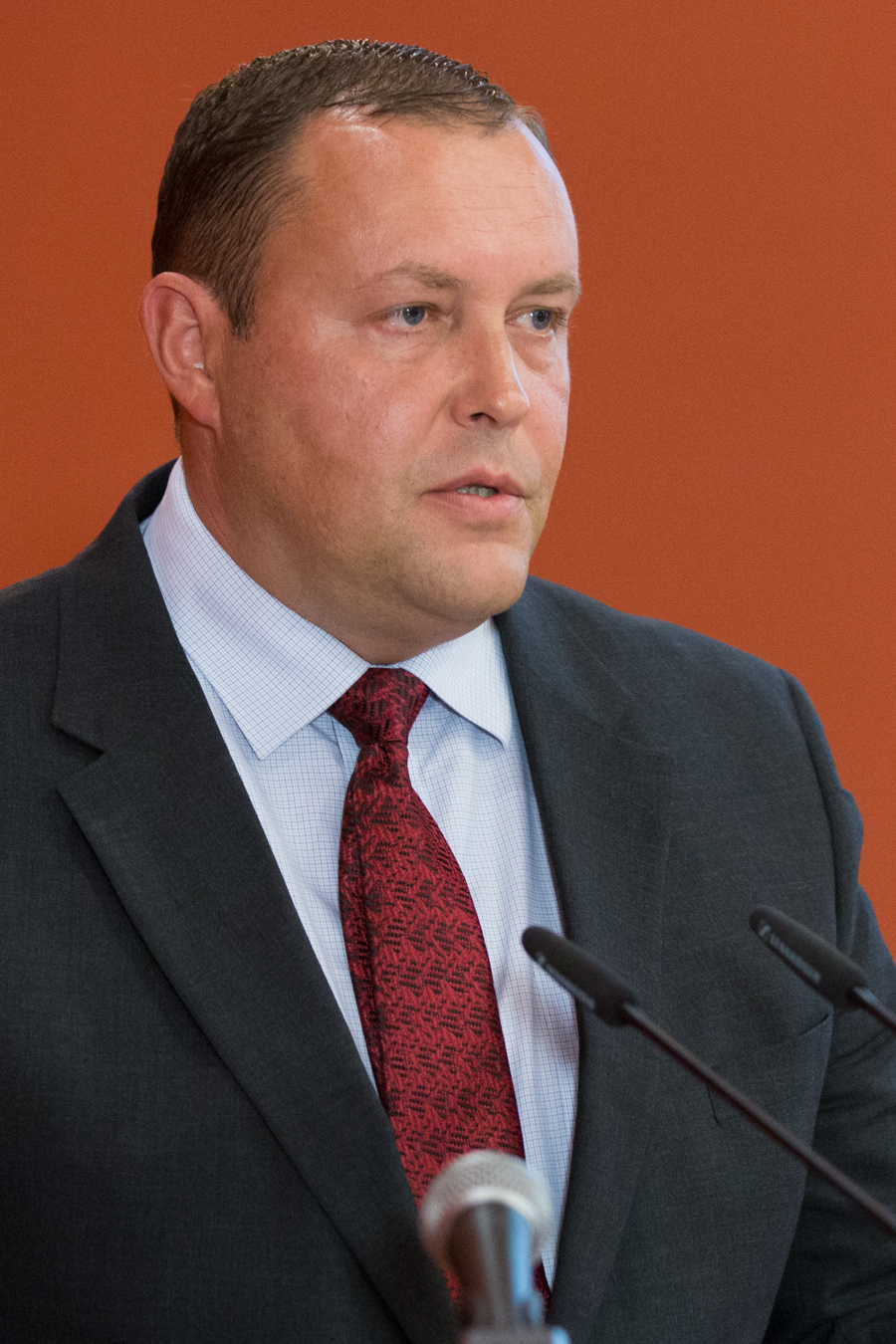 2015.gada 26.oktobris. Saeimā norisinās Starptautiska konference "Drošības kompass - efektīvi risinājumi cilvēktirdzniecības novēršanai". Foto: Ernests Dinka, Saeima Izmantošanas noteikumi: saeima.lv/lv/autortiesibas